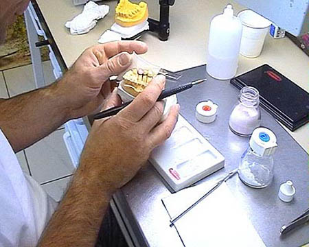 dental bridge, Zahnbrücke